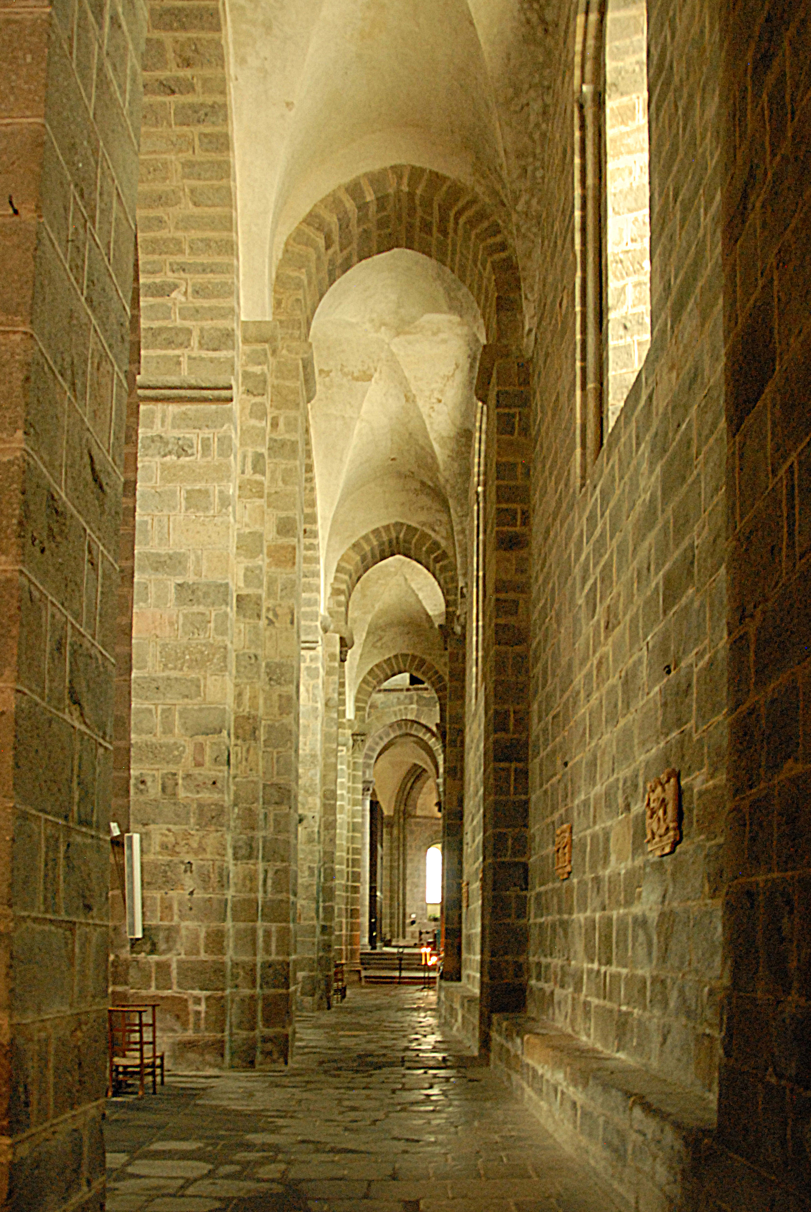 St-Pierre de Le Dorat, südl. Seriternschiff, aus 3. Joch